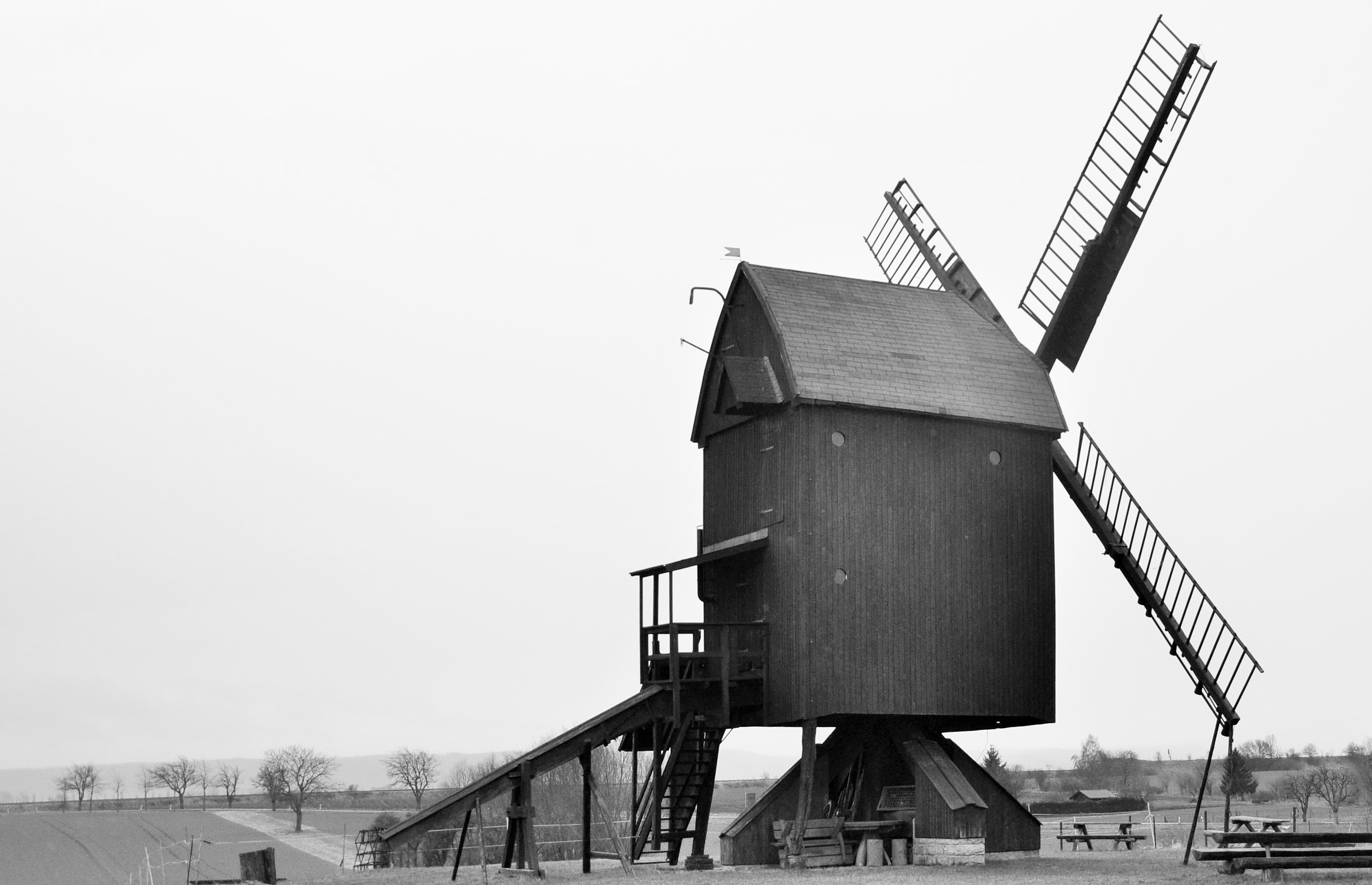 Die Bockwindmühle Danstedt steht am Ortsrand der Gemeinde, die in der Nähe von Halberstadt im Vorharzland liegt.